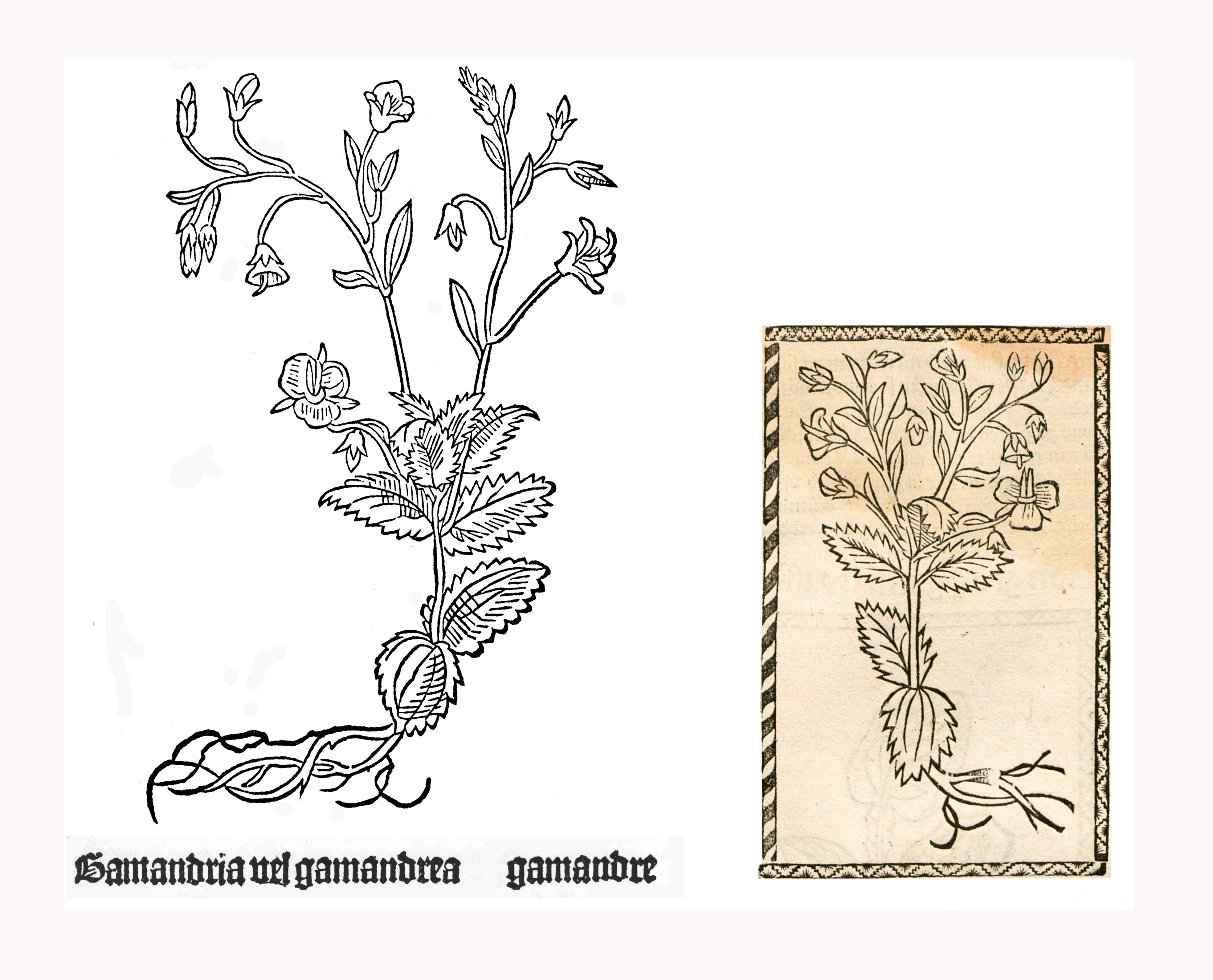 Abbildung von Gamander (Veronica chamaedrys)